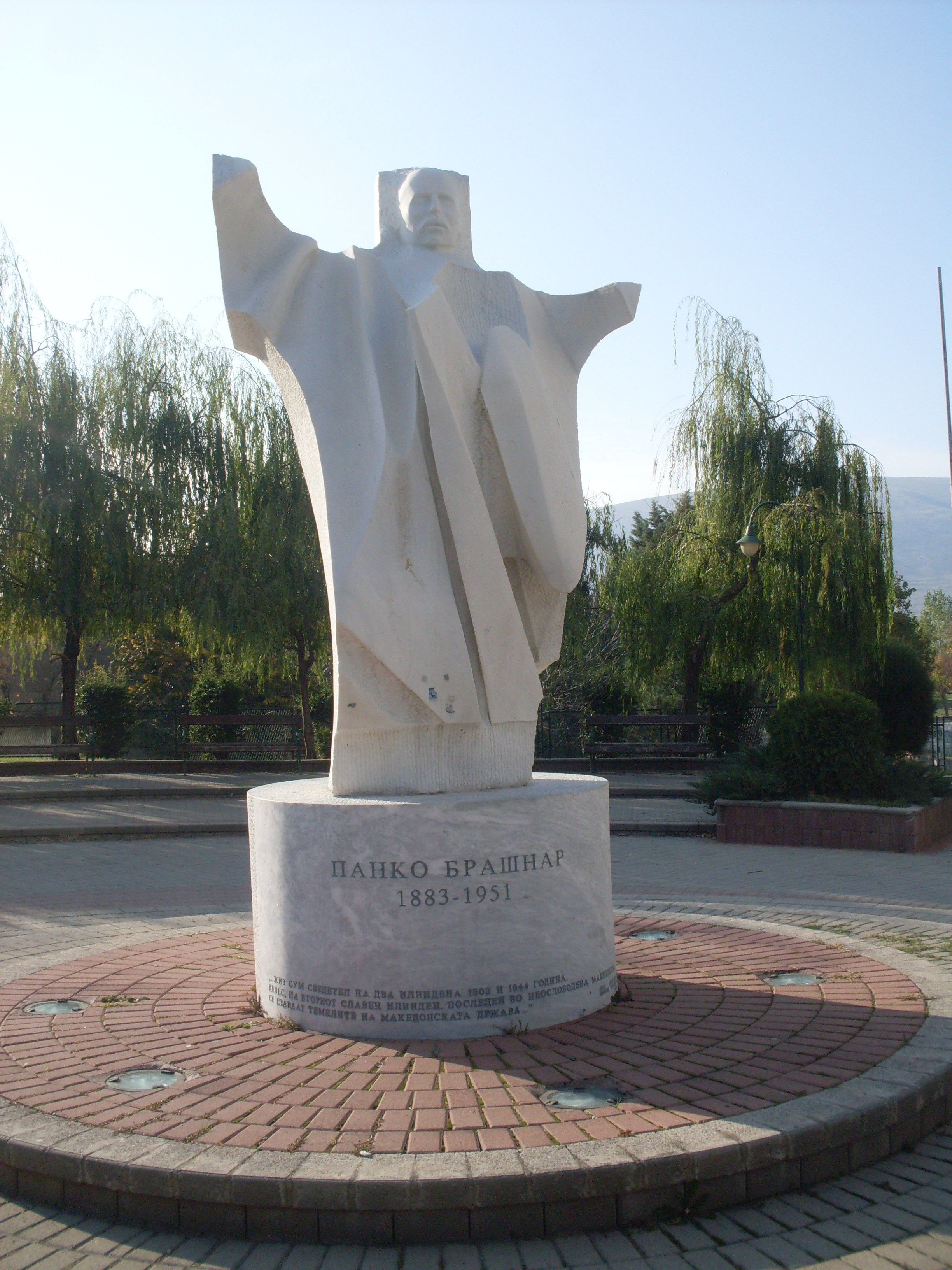 Споменикот на Панко Брашнар во град Велес